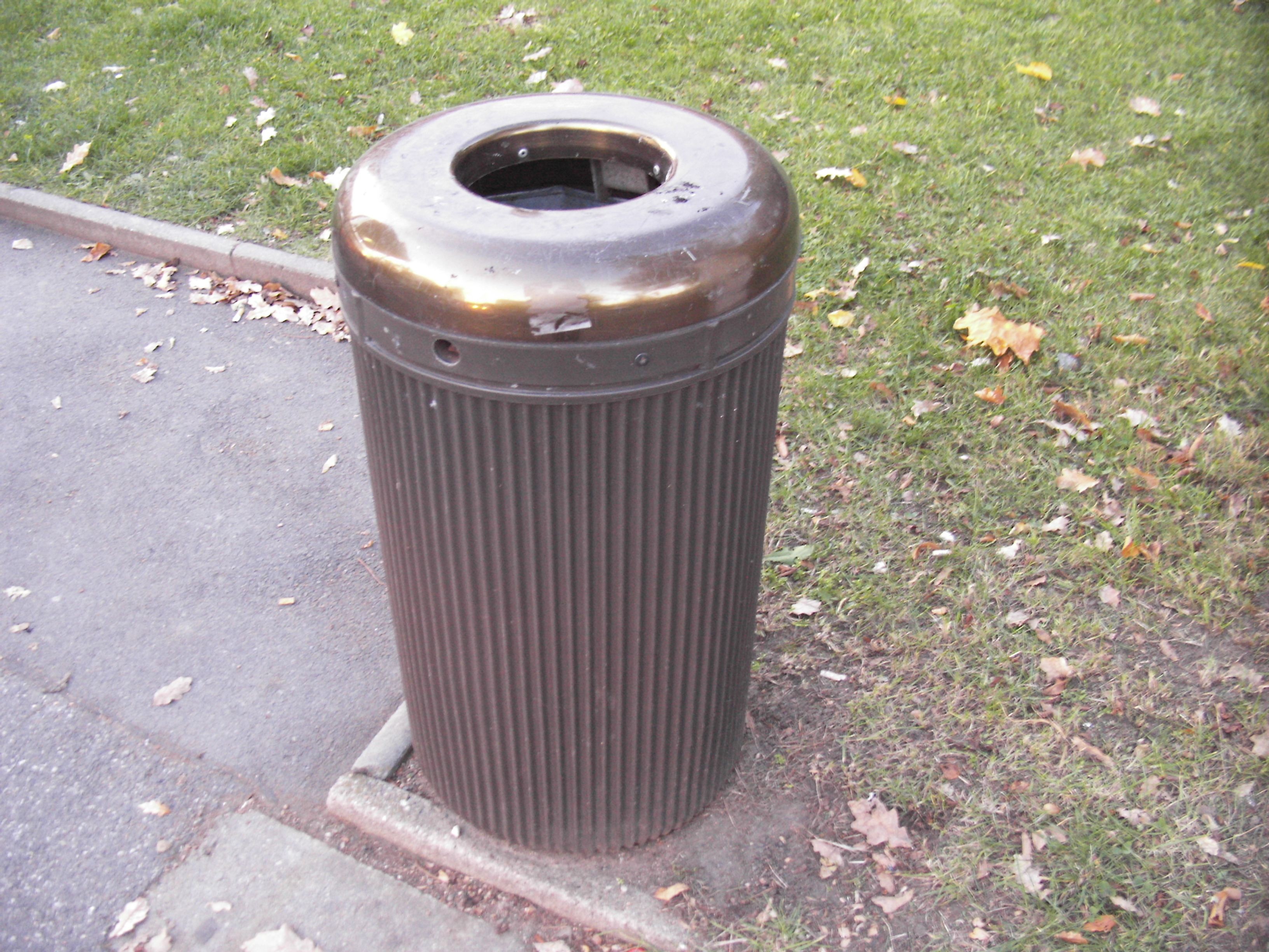 Abfallbehälter in Dresden; Solche Behälter werden zum Beispiel neben Haltestellen aufgestellt.